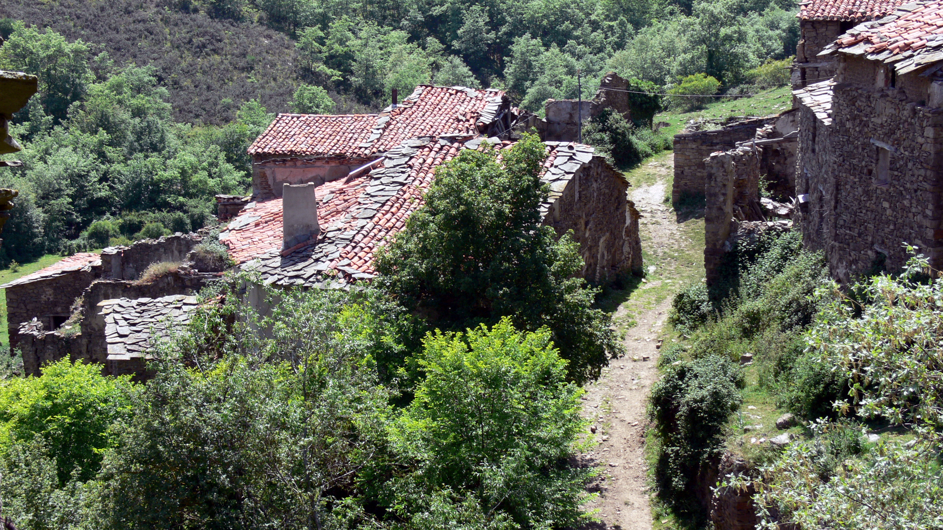 Bucesta, aldea de Santa Engracia del Jubera en La Rioja, España.